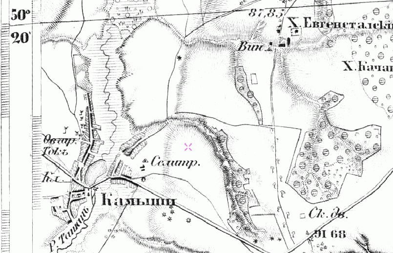 Фрагмент карти Полтавської губернії.село Комиші. 1869 р.